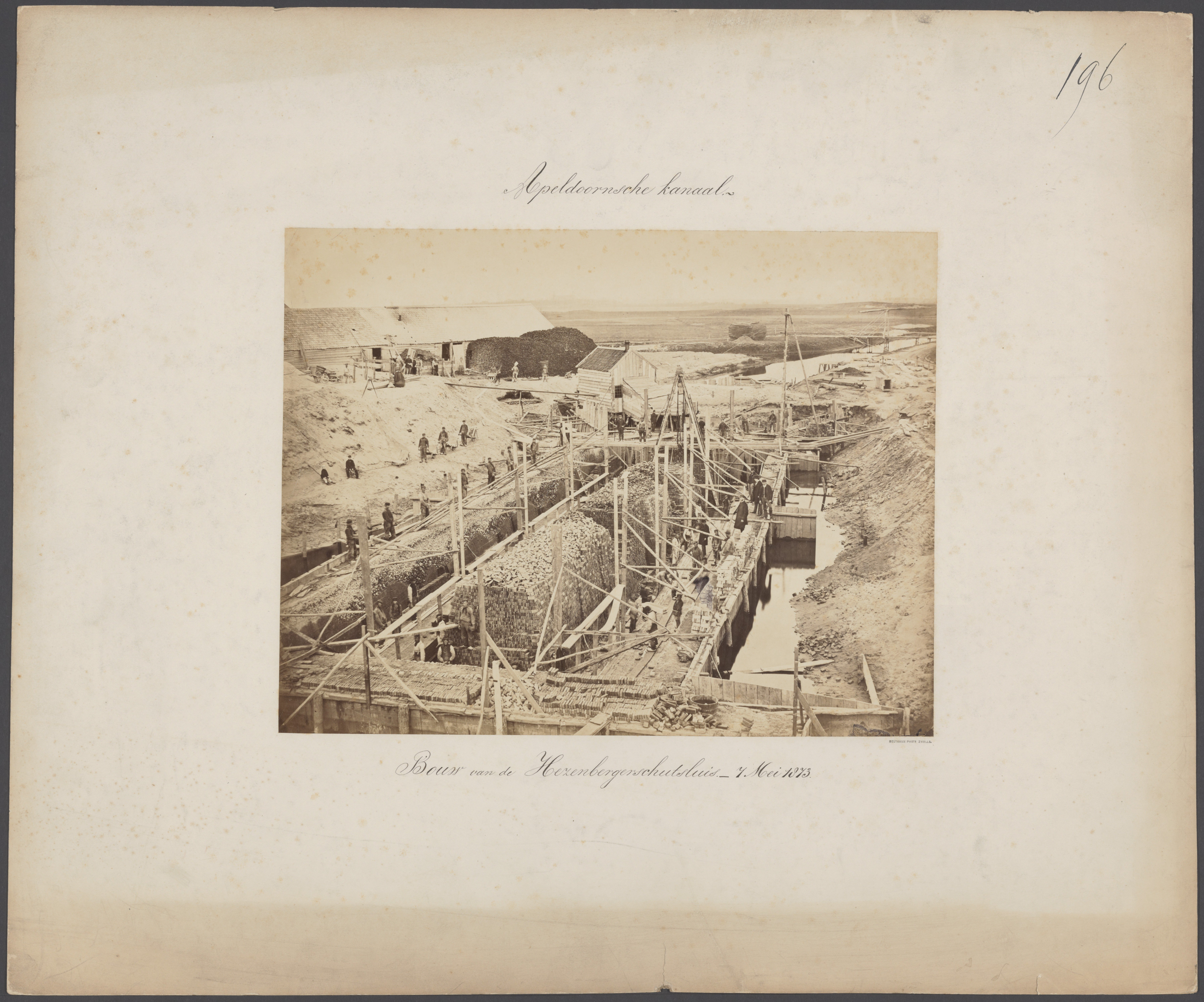 Collectie / archief : Fotocollectie Rijkswaterstaat : Metadata : Collectie / Archief : Fotocollectie Rijkswaterstaat Reportage / Serie : Werken in Gelderland en Overijssel Beschrijving : Apeldoornsche kanaal. Bouw van de Hezenbergerschutsluis Datum : 7 mei 1873 Locatie : Gelderland, Gelderland Trefwoorden : schutsluizen, waterbouw Fotograaf : Deutmann, Herman Auteursrechthebbende : Materiaalsoort : Foto (zwart/wit) Nummer archiefinventaris : bekijk toegang 2.24.11 Inventarisnummer : 15 Bestanddeelnummer : 131